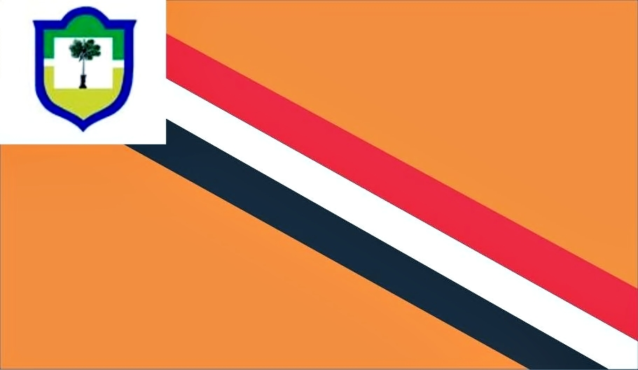 Bandeira de São Bernardo (Maranhão)